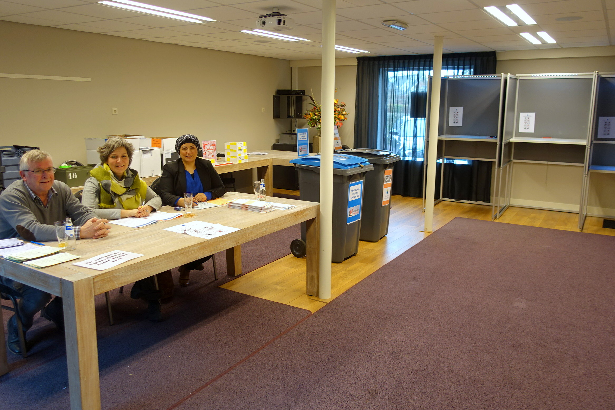 Stemlokaal Pakhuus in Silvolde (gem. Oude IJsselstreek), verkiezingen voor de Provinciale Staten en waterschappen, 2019